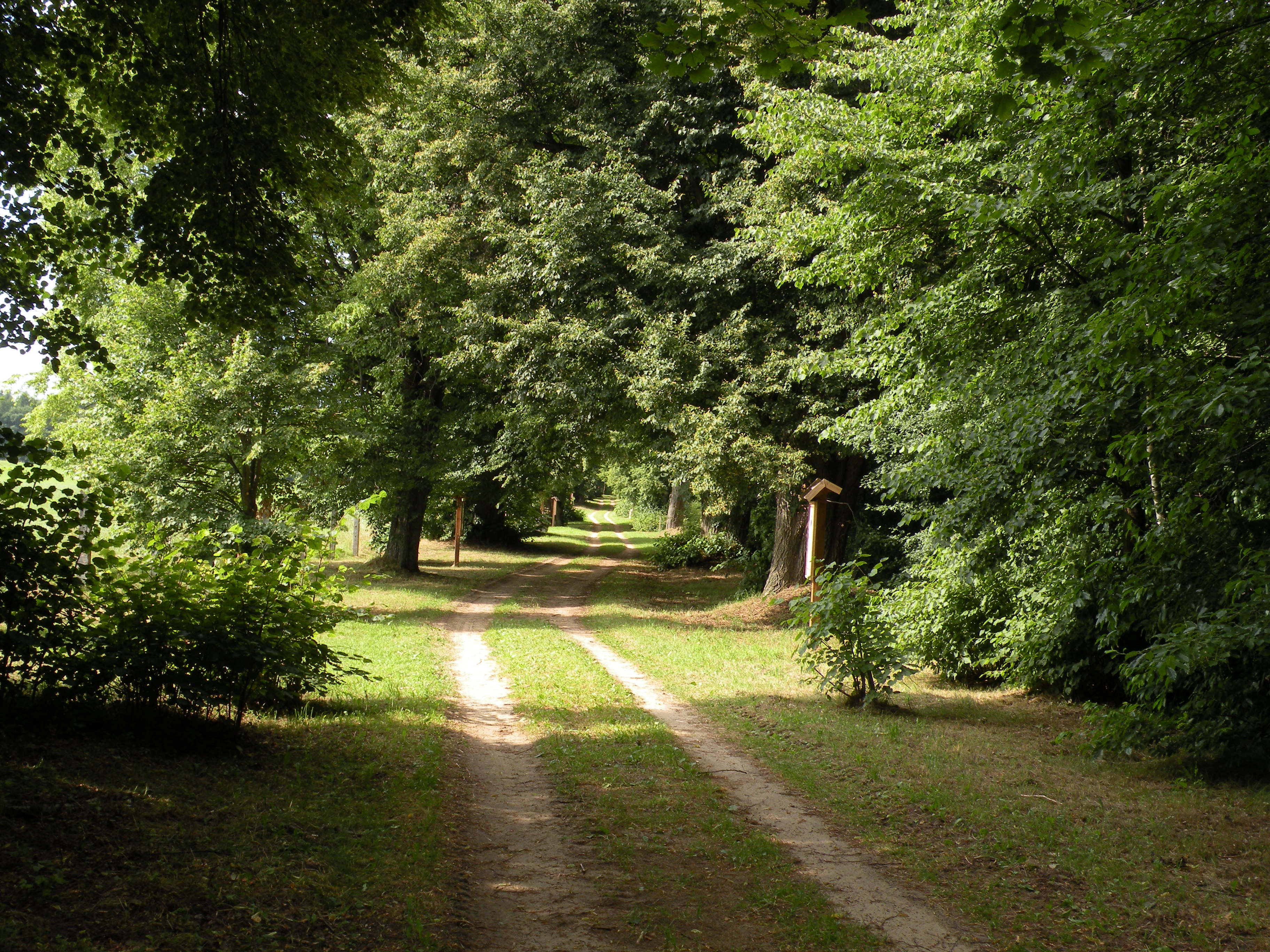 Aleja Biskupów w Bałdach, stan 2013 roku.